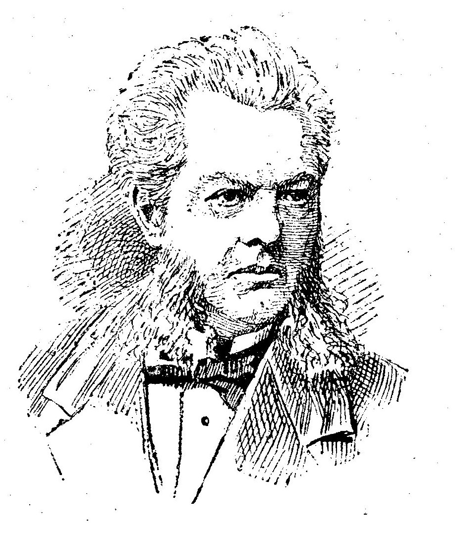 Régis Cadier